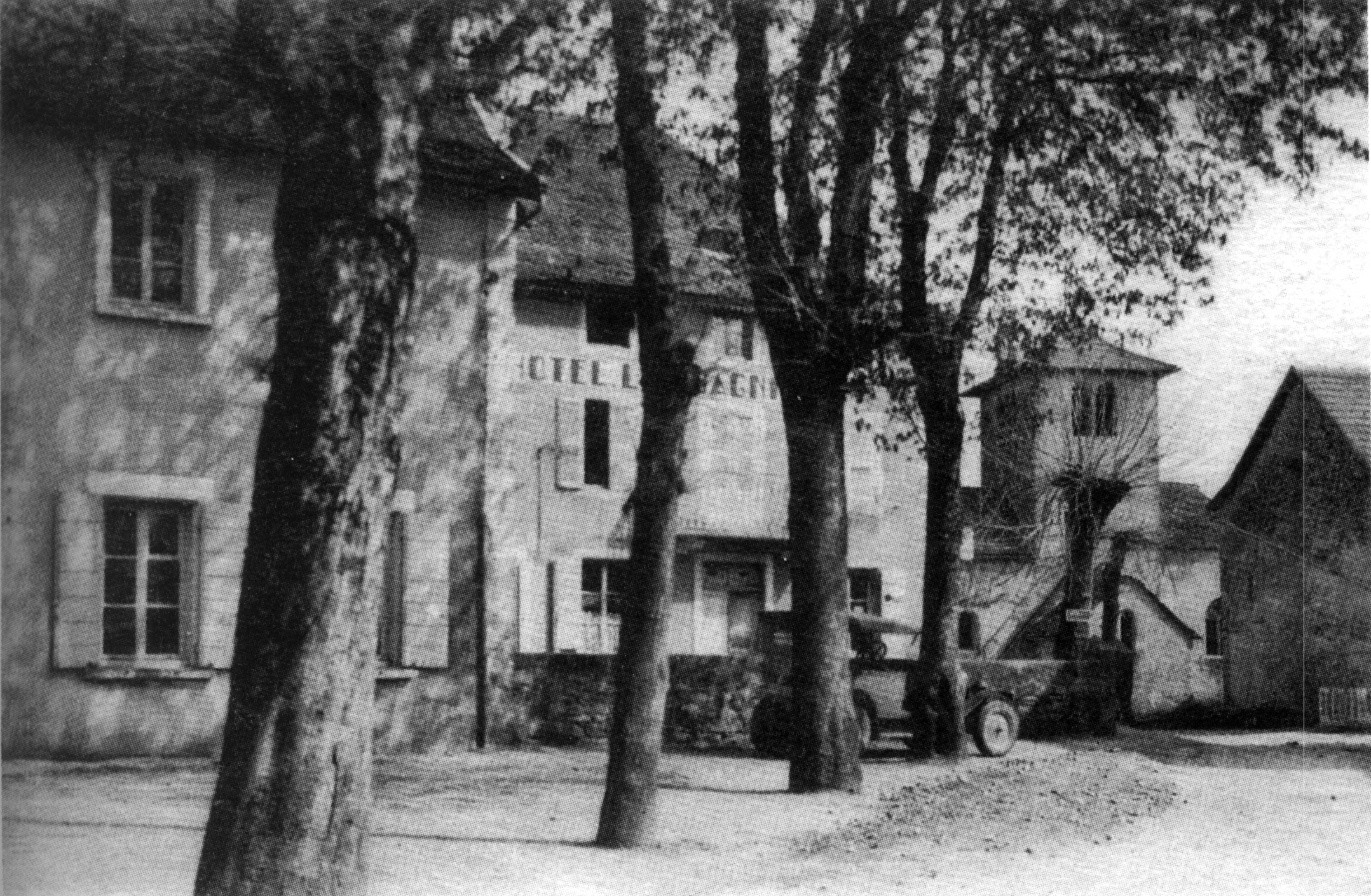 Parmilieu, vers 1930